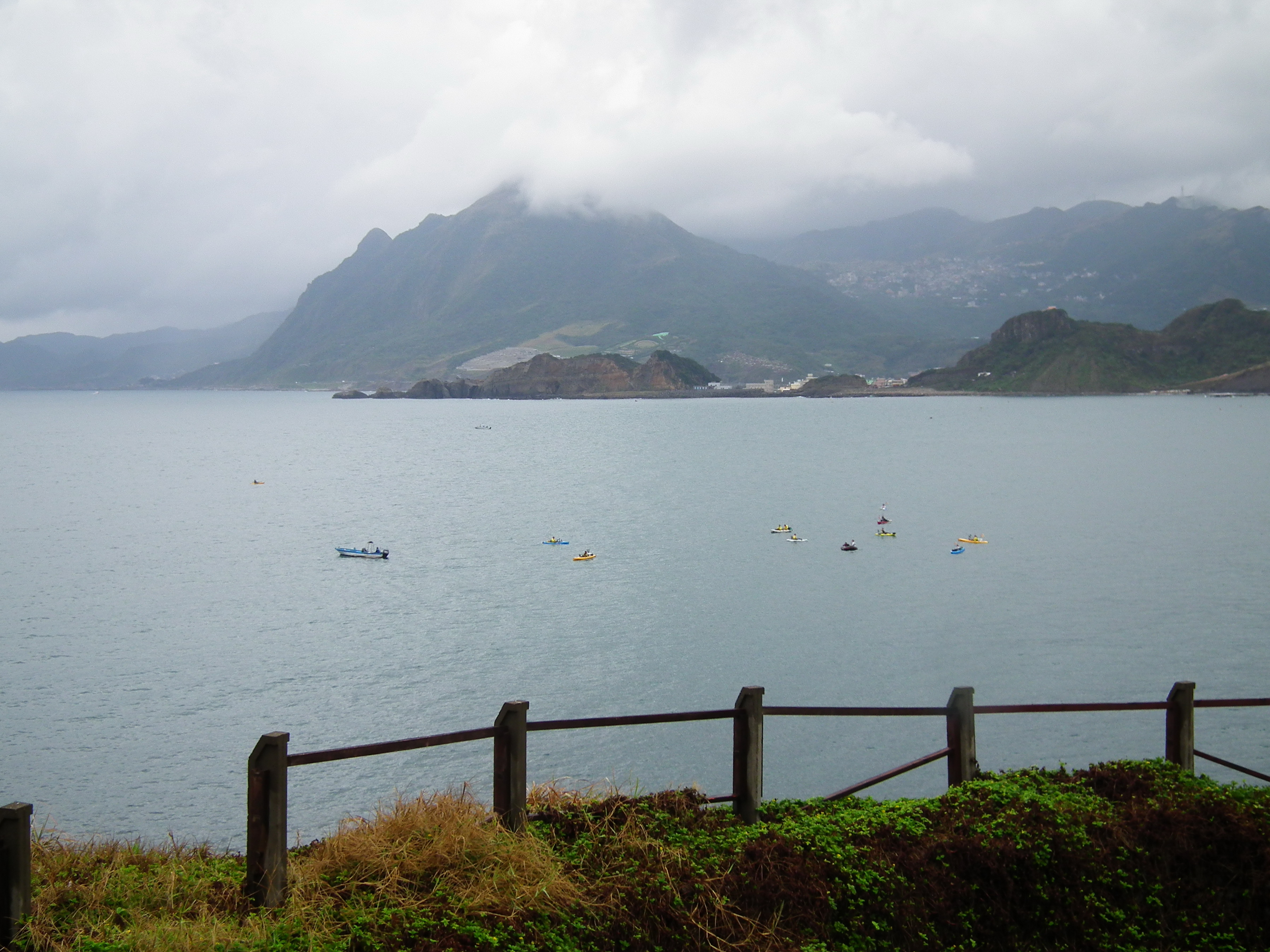 Keelung Mountain 基隆山